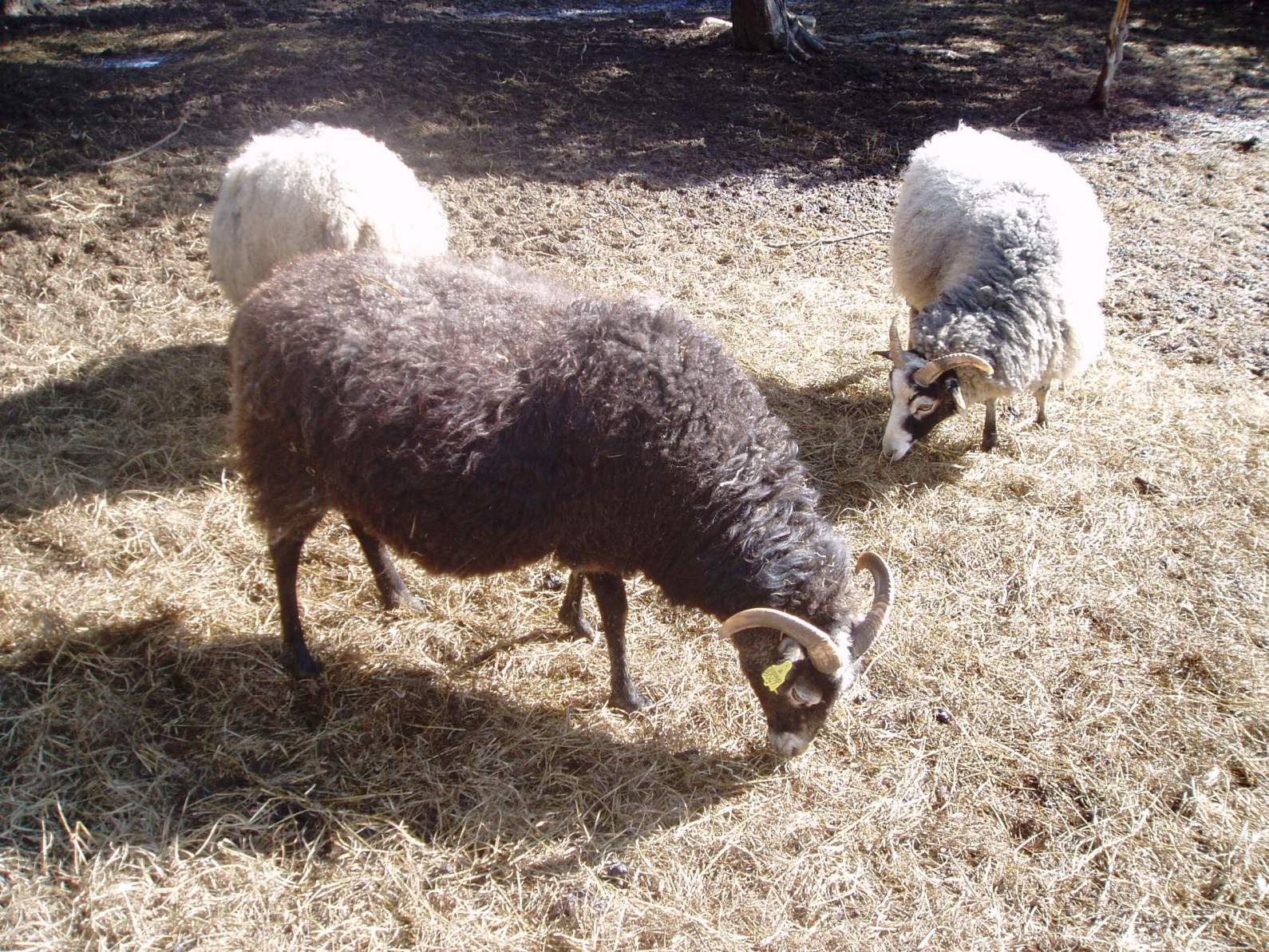 Gutefår i Tyresta nationalpark